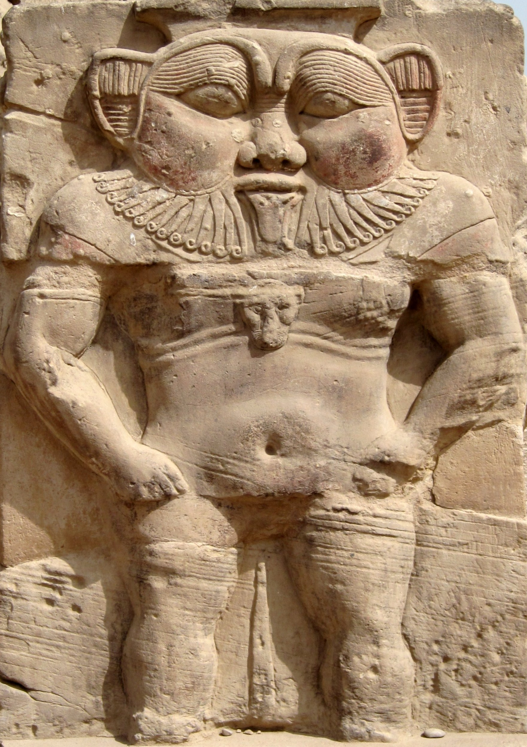 Relief des Gottes Bes neben dem römischen Nordtor des Tempelkomplexes von Dendera, Ägypten